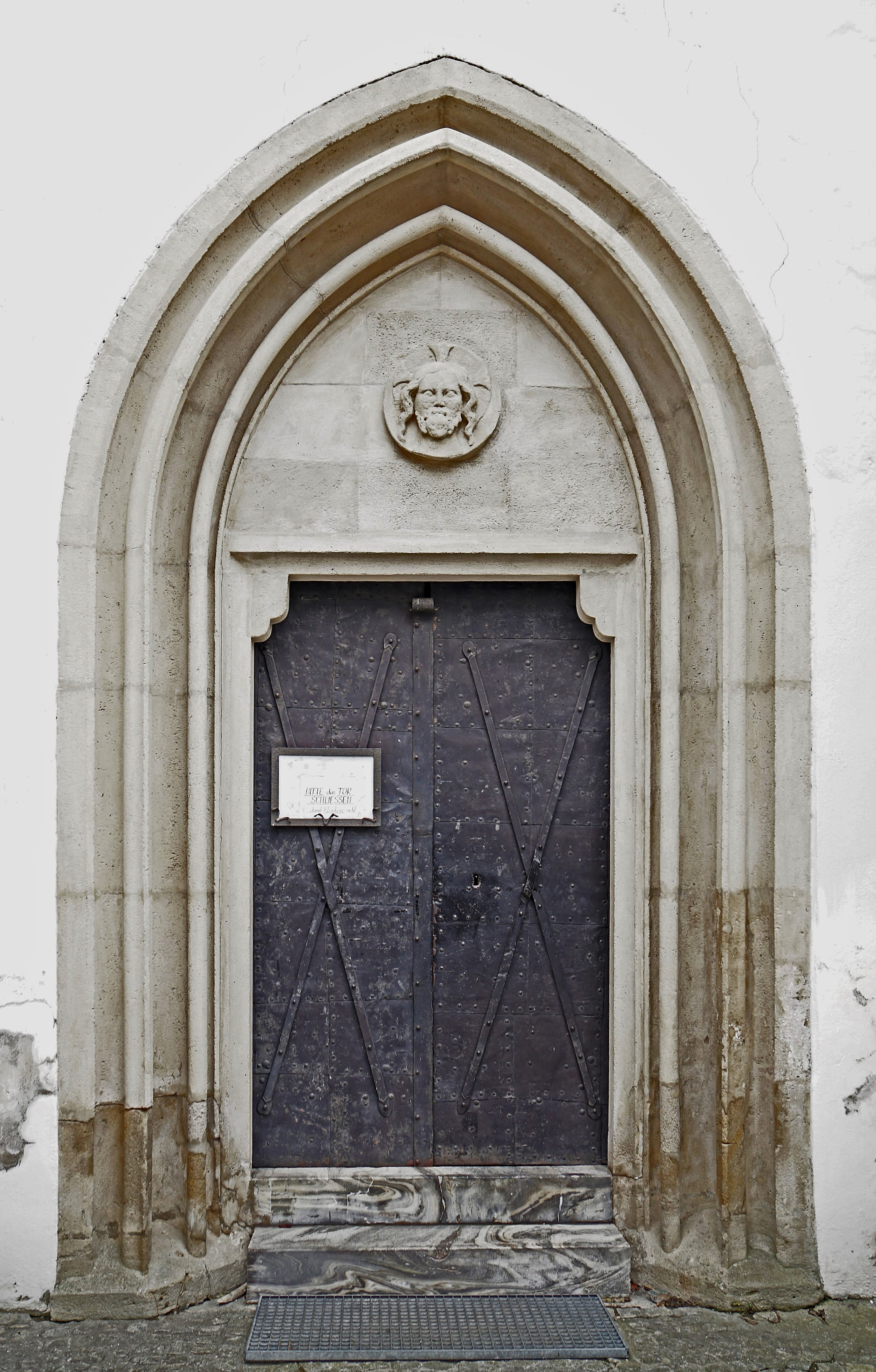 Klosterkirche St. Veit an der Glan, gotisches Portal mit eisenbeschlagener Tür